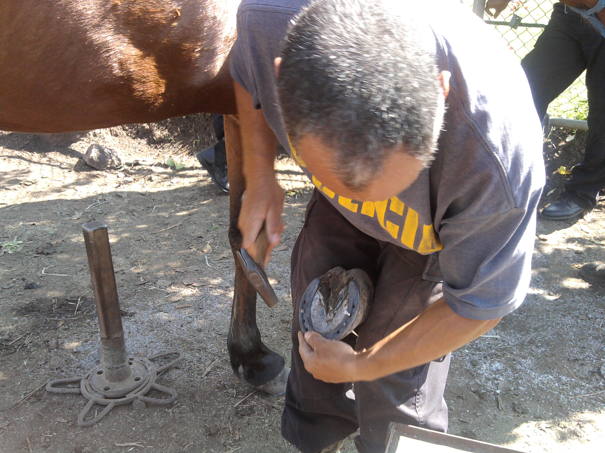 herrada